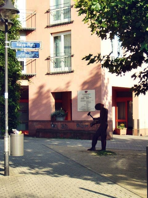 Hülyaplatz in Frankfurt-Bockenheim vor dem Altersheim in der Friesengasse. Im Hintergrund der an den Hammering Man angelegte AntiNaziman.